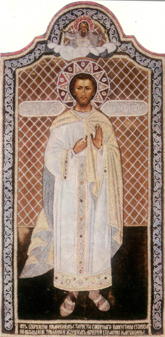 Святой Авраамий. Икона. Россия. Конец XIX в. Из Успенского собора во Владимире.